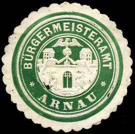 Sealing stamp Title: Bürgermeisteramt Arnau Description: grün, weiß, geprägt Place: Arnau size: 4 cm